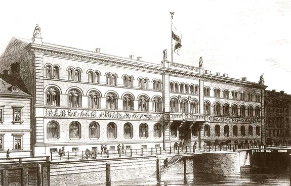 Das Gebäude der Königlichen Münze in der Unterwasserstraße in Berlin.